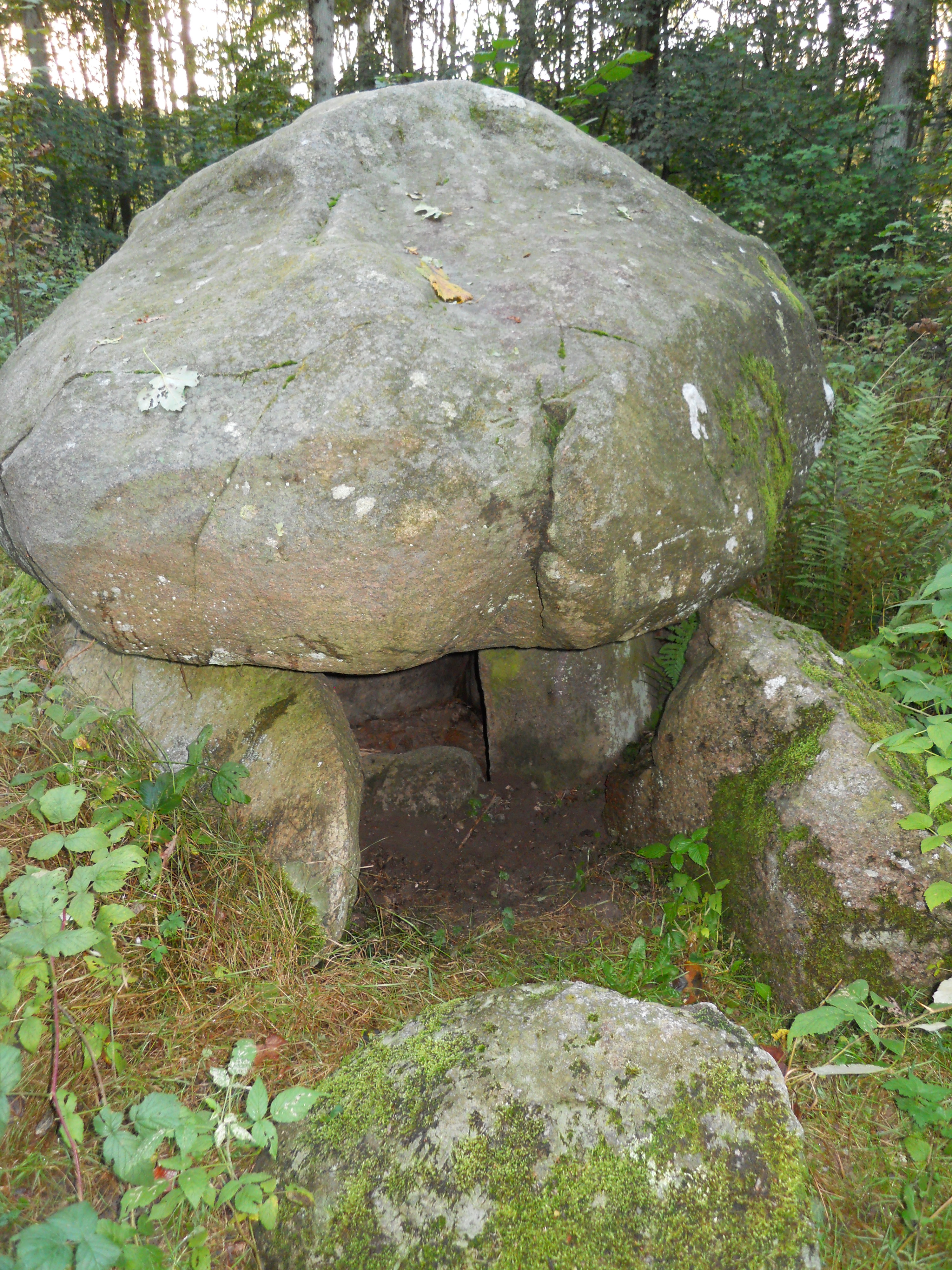 Rundhøj ved Truelstrup